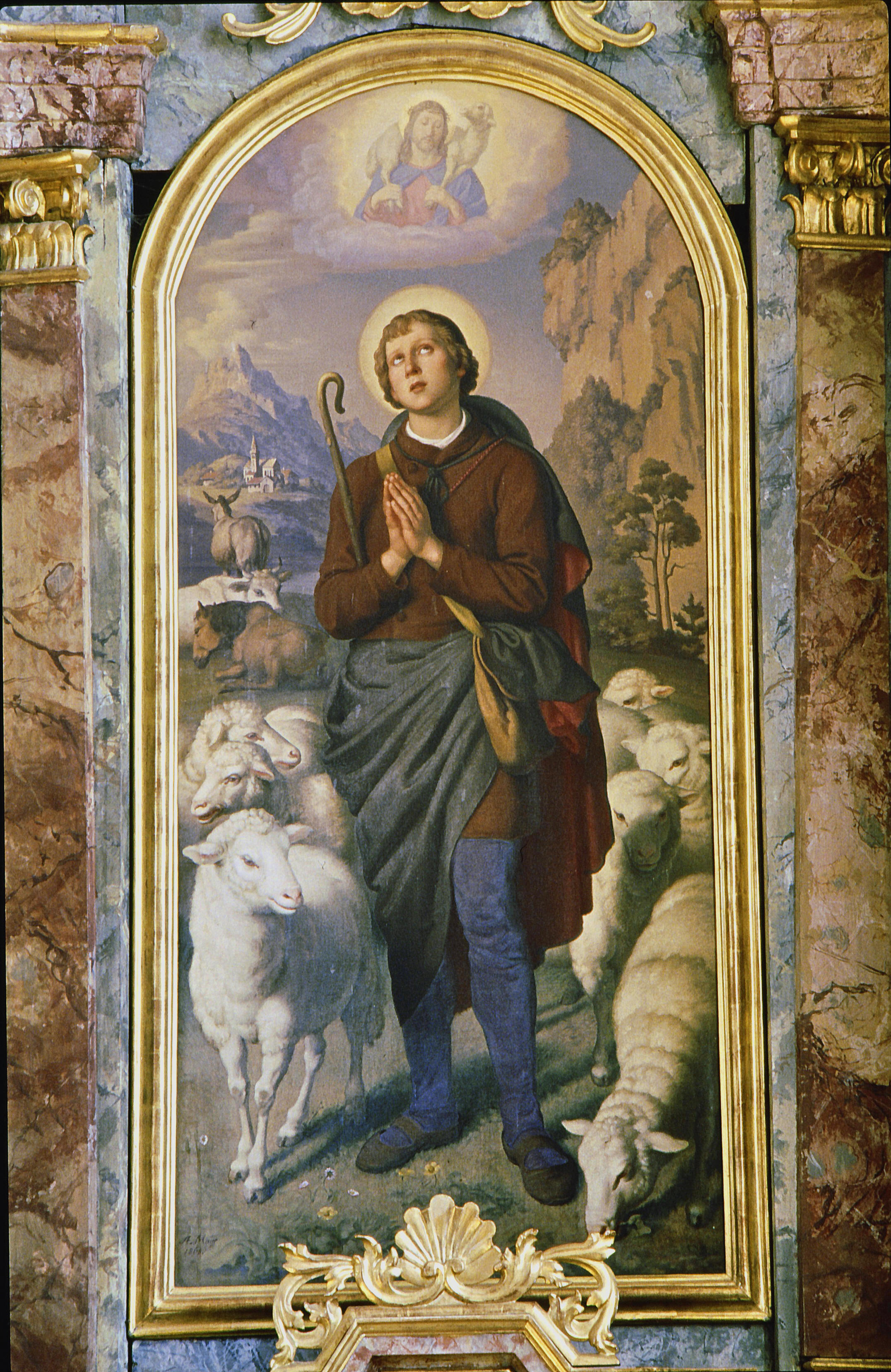 Seitenaltarblatt von Andreas Mayr in der Kirche von Burk (Marktoberdorf)